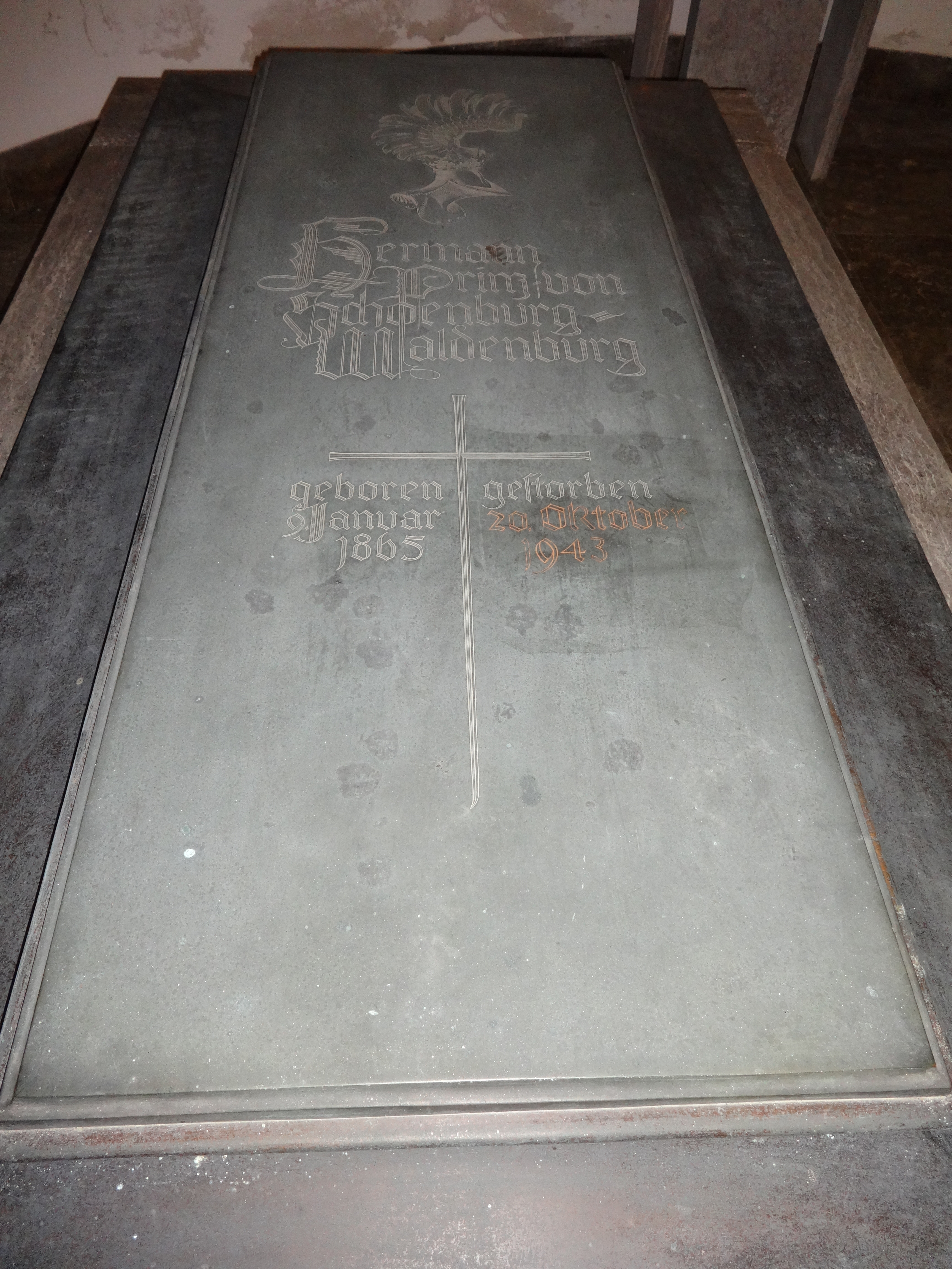 Grabplatte vom Grab des Hermann Prinz von Schönburg-Waldenburg (1865 - 1943) in der Gruft von Schloss Hermsdorf